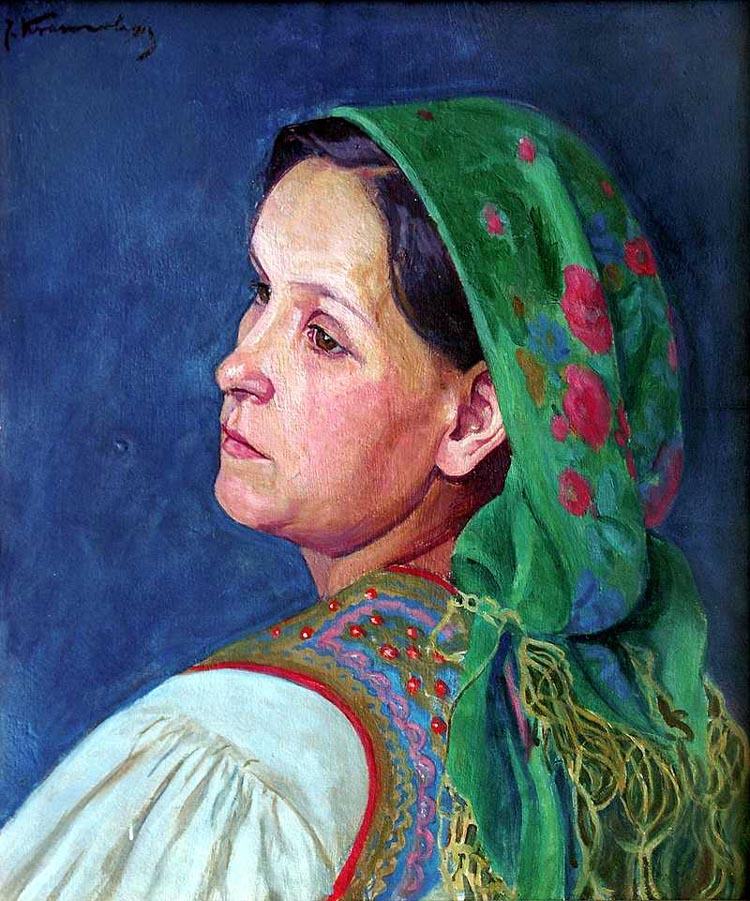 Portret żony w stroju krakowskim